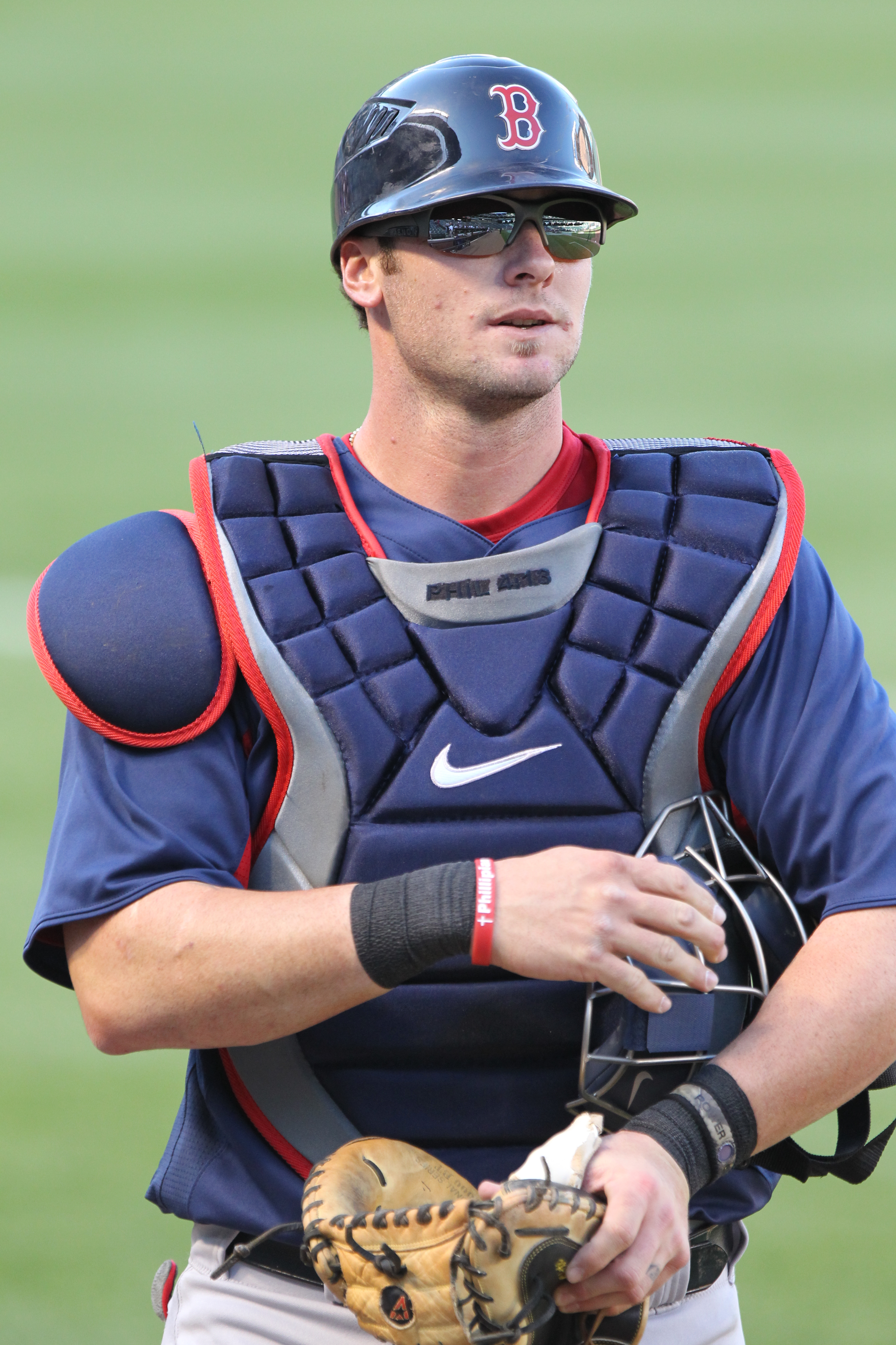 Jarrod Saltalamacchia